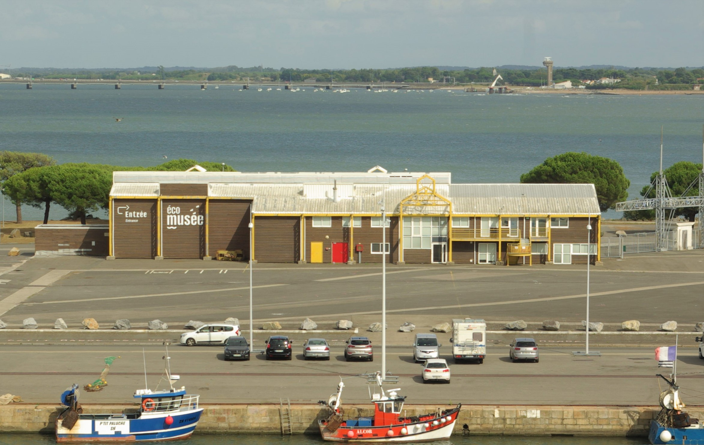 Vue de l'écomusée de Saint-Nazaire sur le toit de la base sous-marine.